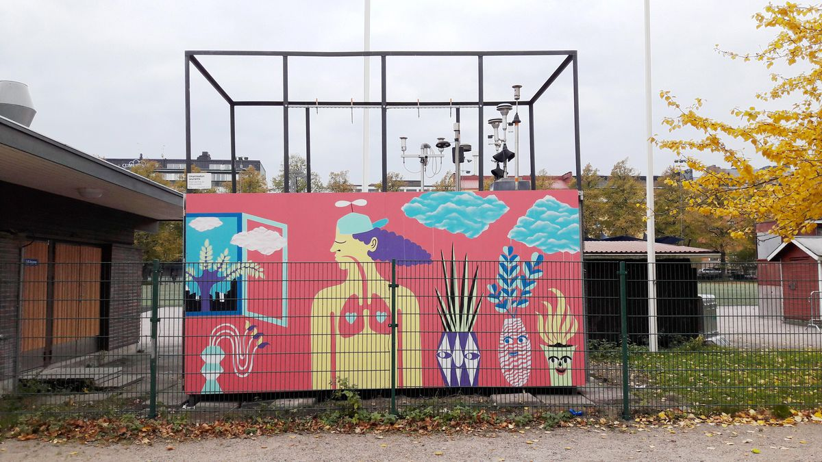 HSY seuraa ilmanlaatua 11 mittauasasemalla eri puolilla pääkaupunkiseutua, esimerkiksi Helsingissä Kalliossa.